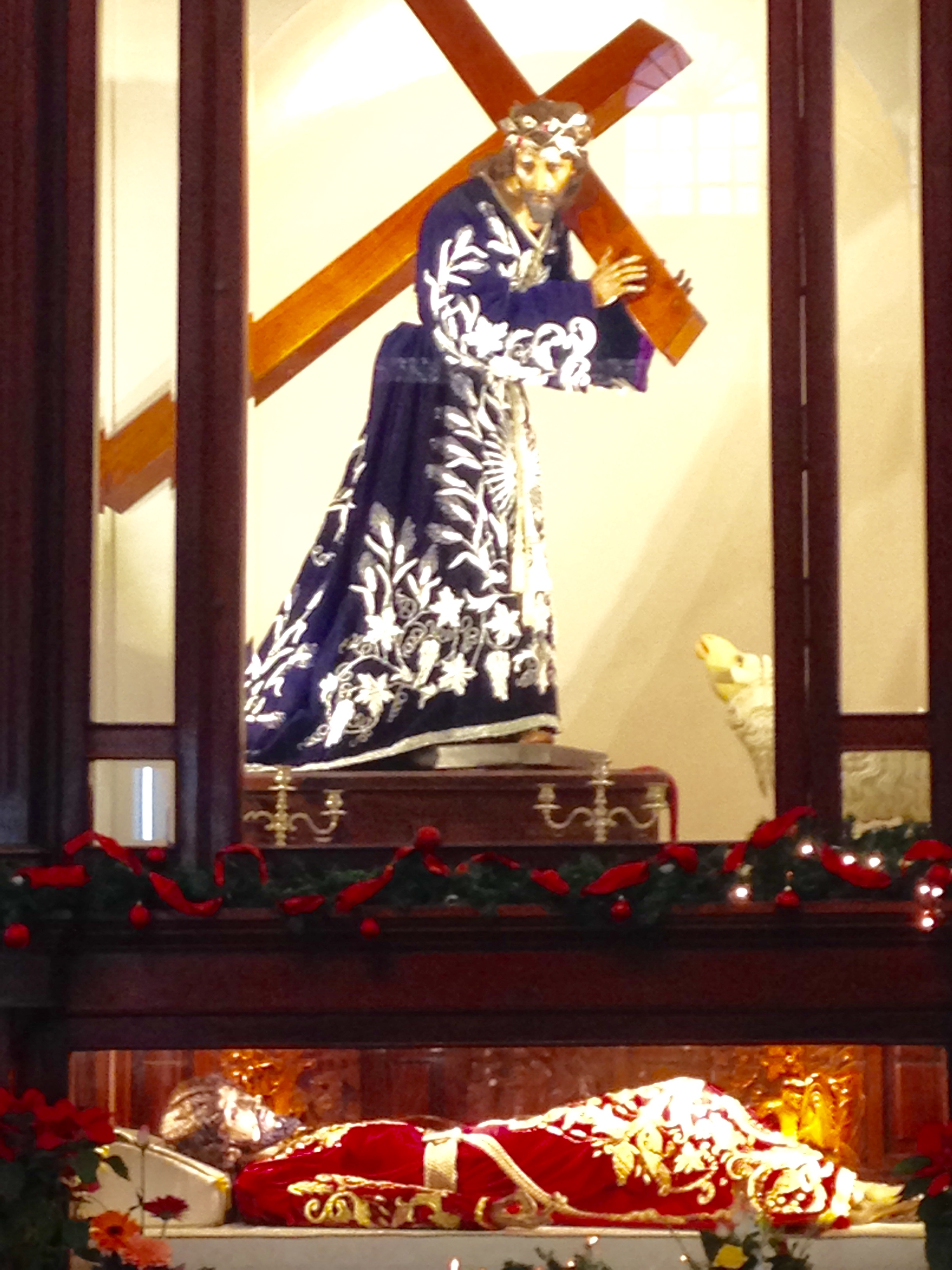 Imágenes de la Pasión de Cristo. Iglesia de La Recolección, Ciudad de Guatemala. Diciembre de 2015.